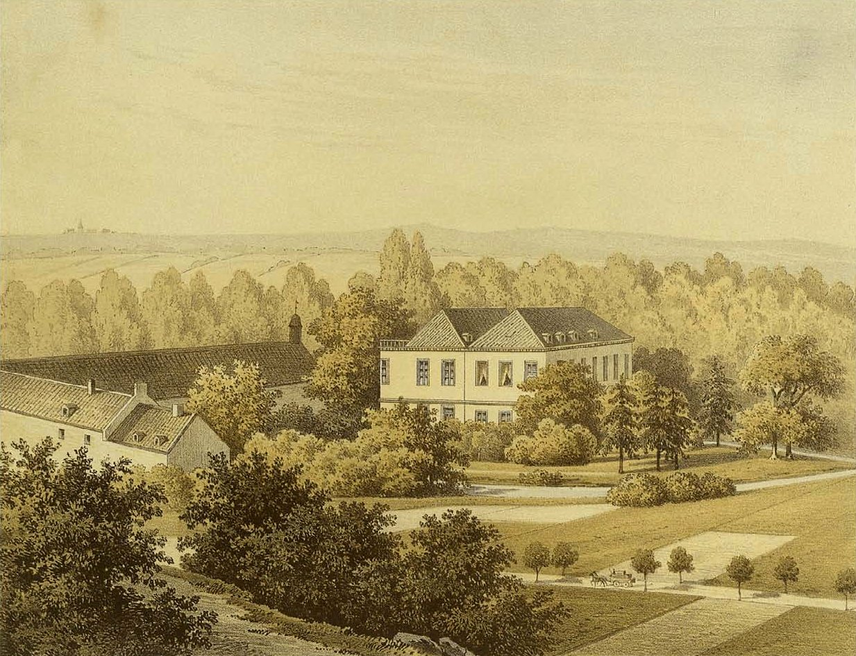 Burg Hemmersbach, Kreis Bergheim